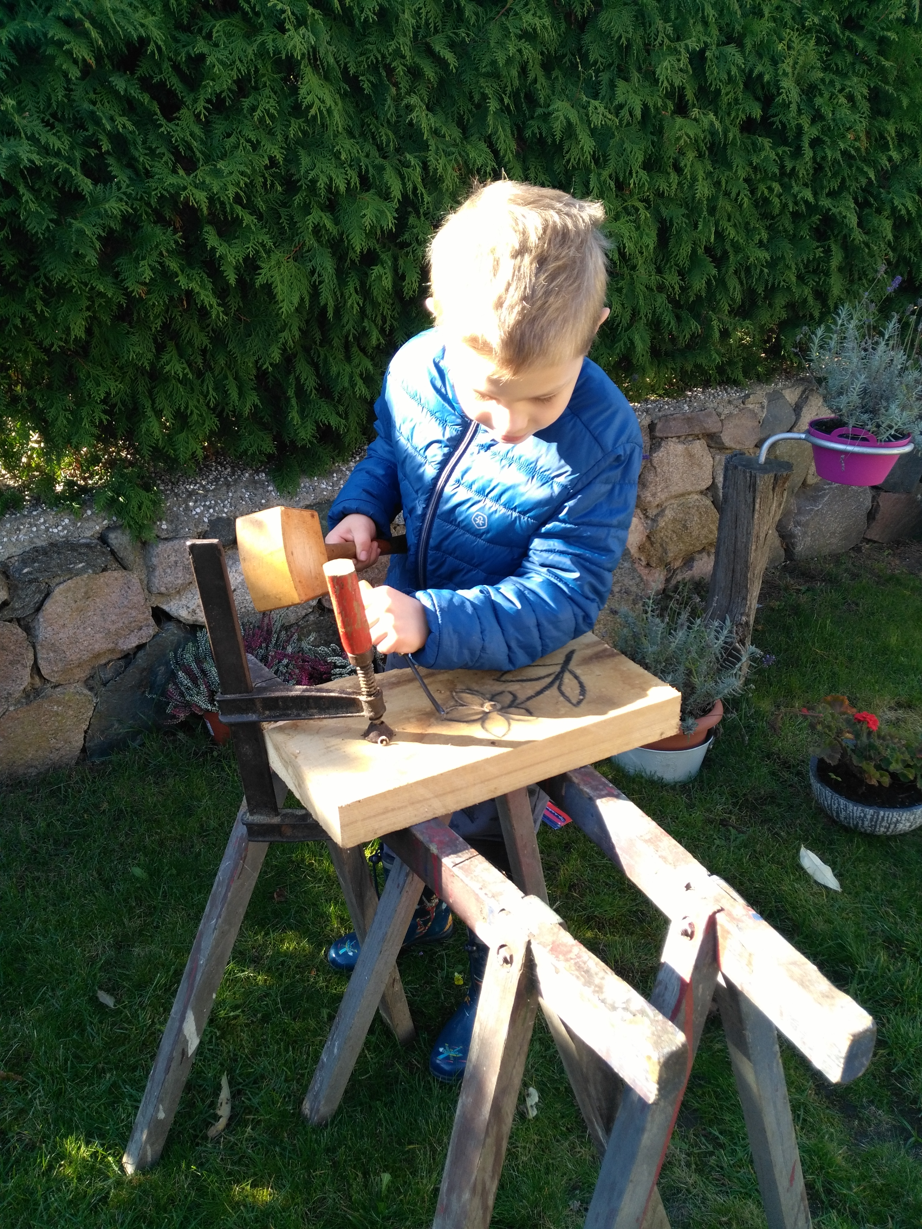 6-jähriger Enkel eines Holzschnitzers beim Ausmeißeln einer Blumenfigur